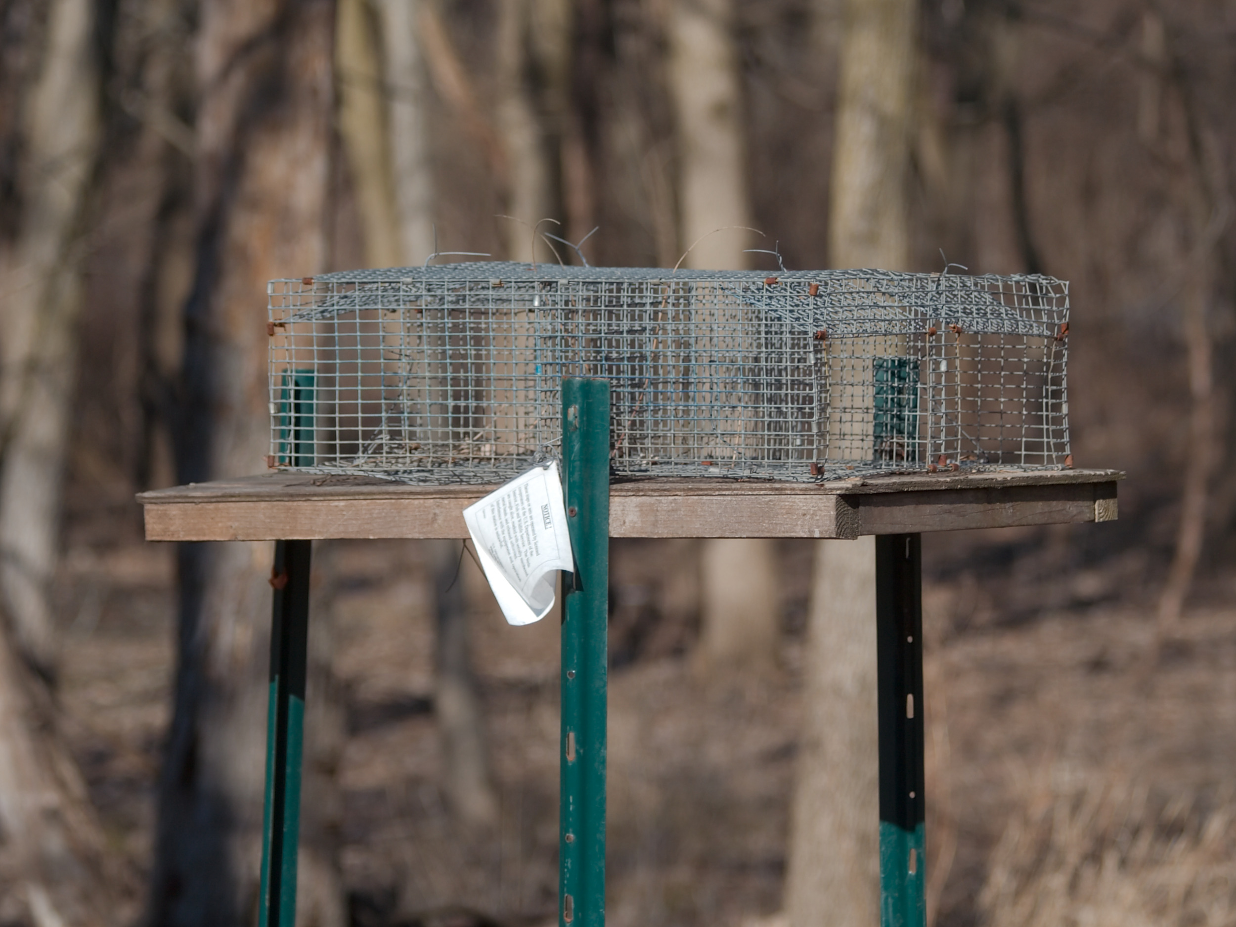 A bird trap, taken in Urbana, IL